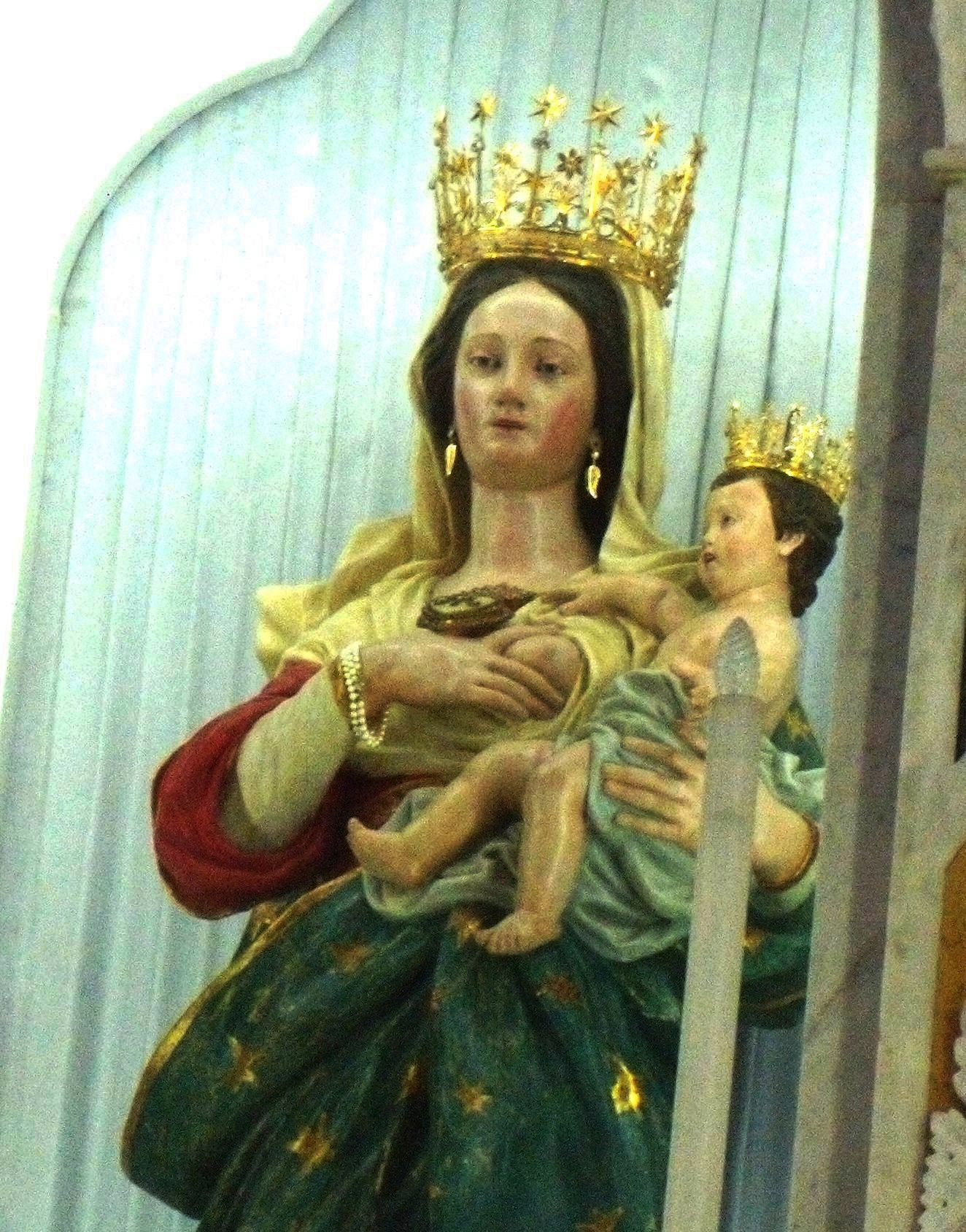 Particolare della statua della Madonna delle Grazie, realizzata a Napoli nel 1732.